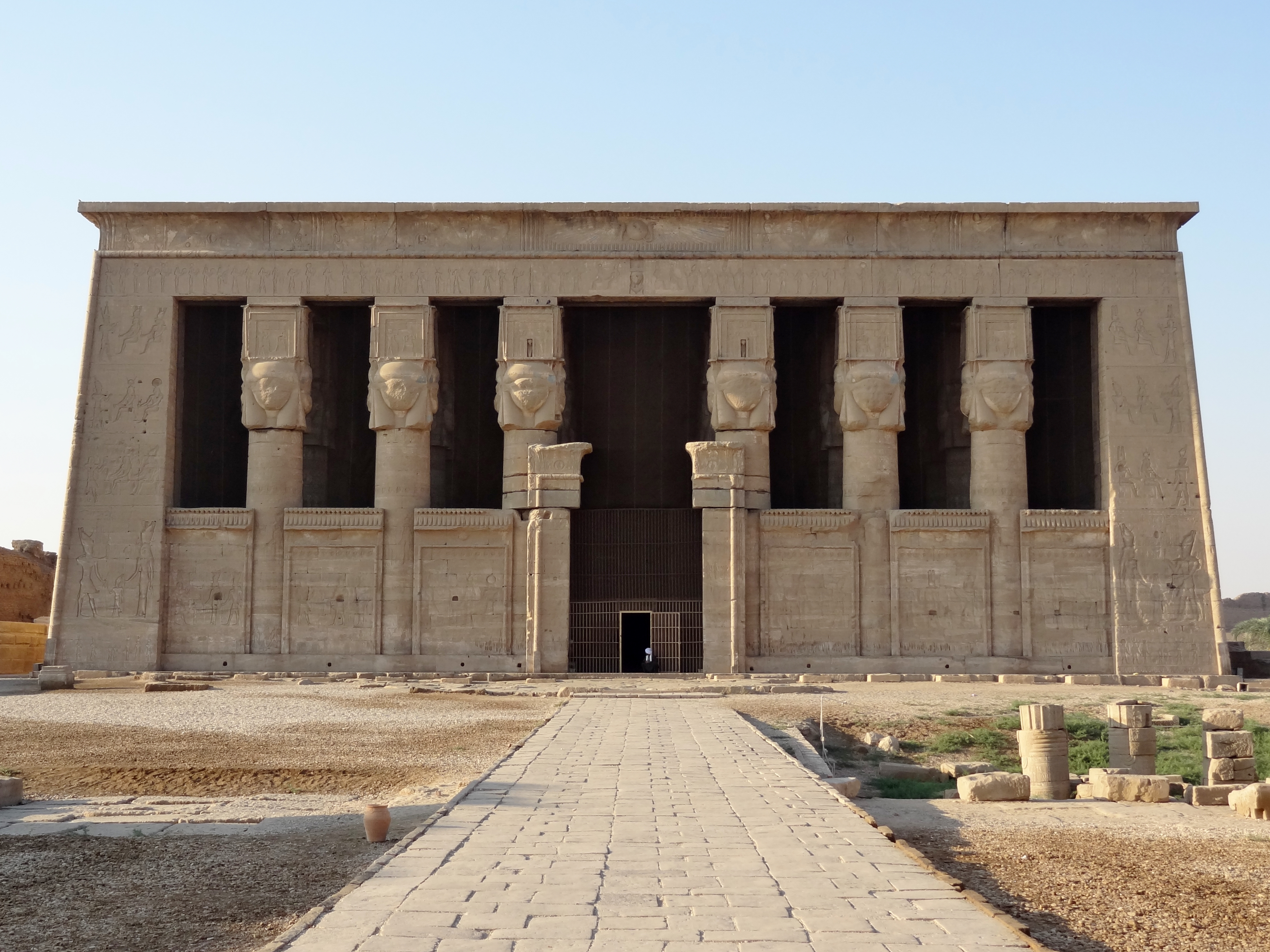 Hathor-Tempel von Dendera, Ägypten